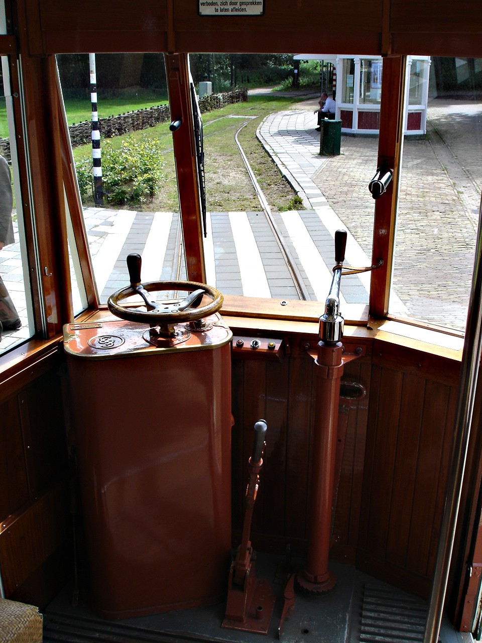 Stuurstand GETA 76